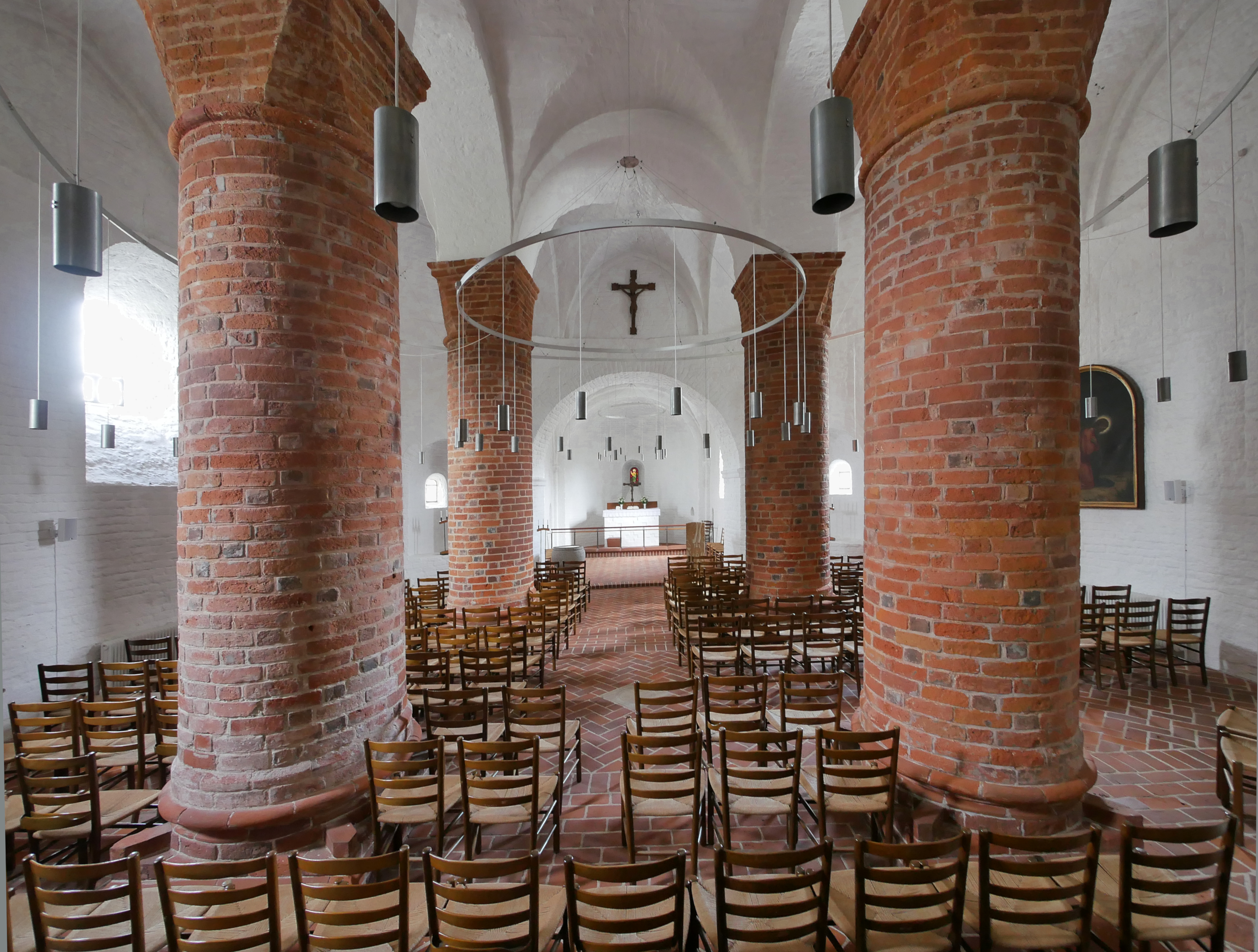 Kirche in Thorsager - Blick mit Superweitwinkel von der Orgel in den Kirchenraum. Auf den vier Säulen und den sie verbindenden Bögen ruht der viereckige Turmaufbau.